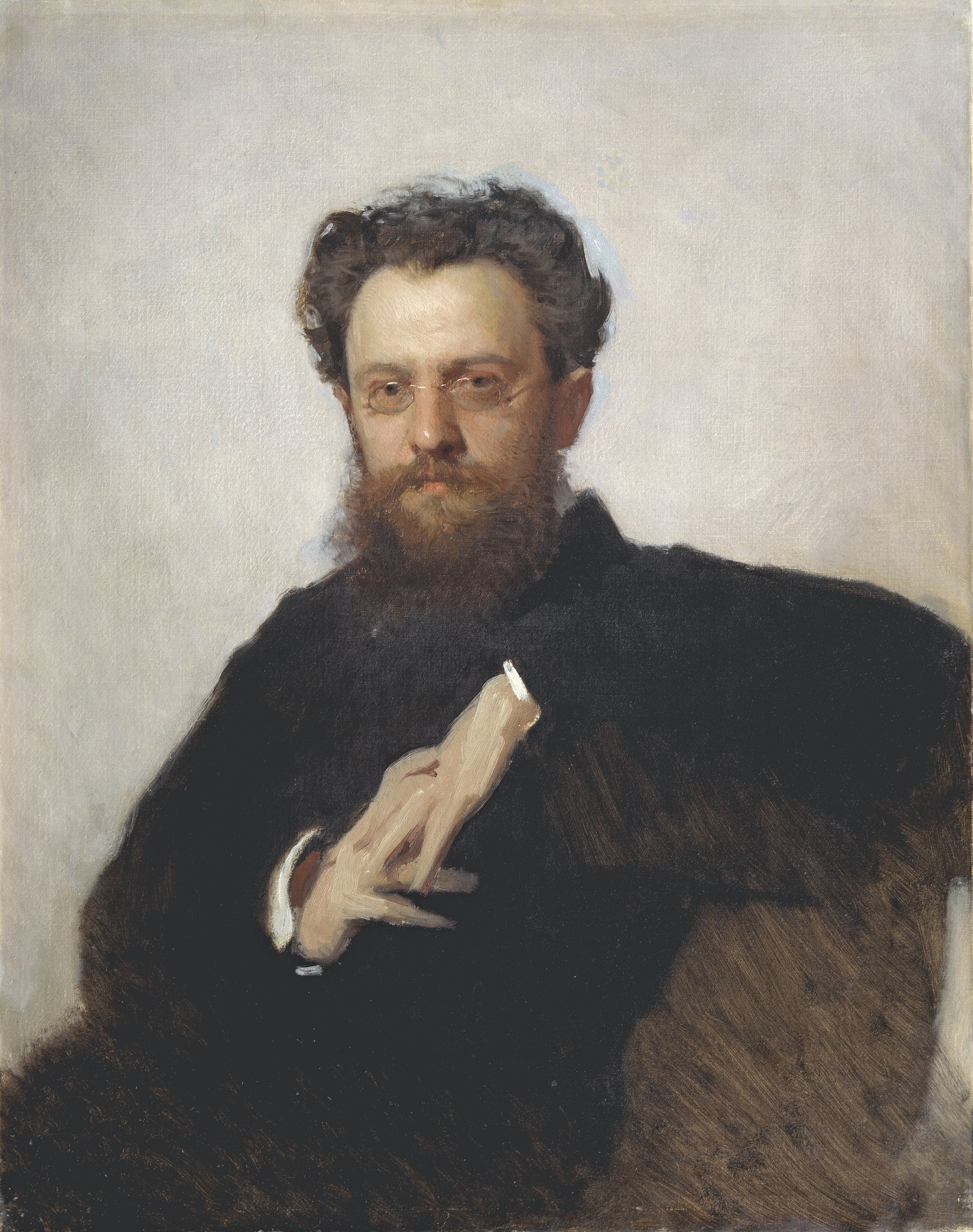 Портрет Адриана Викторовича Прахова